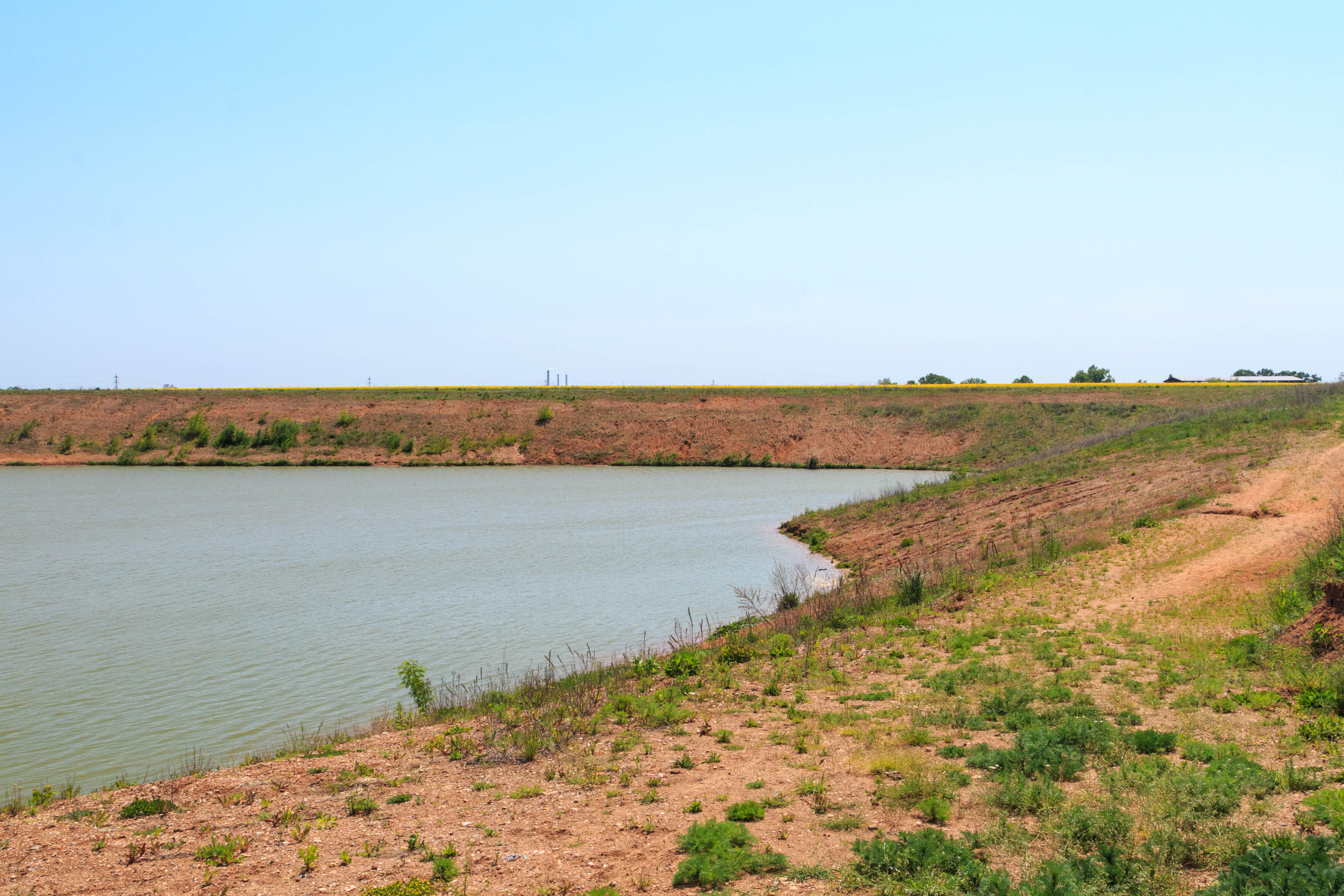 Písník Praskačka Project: Vodstvo.